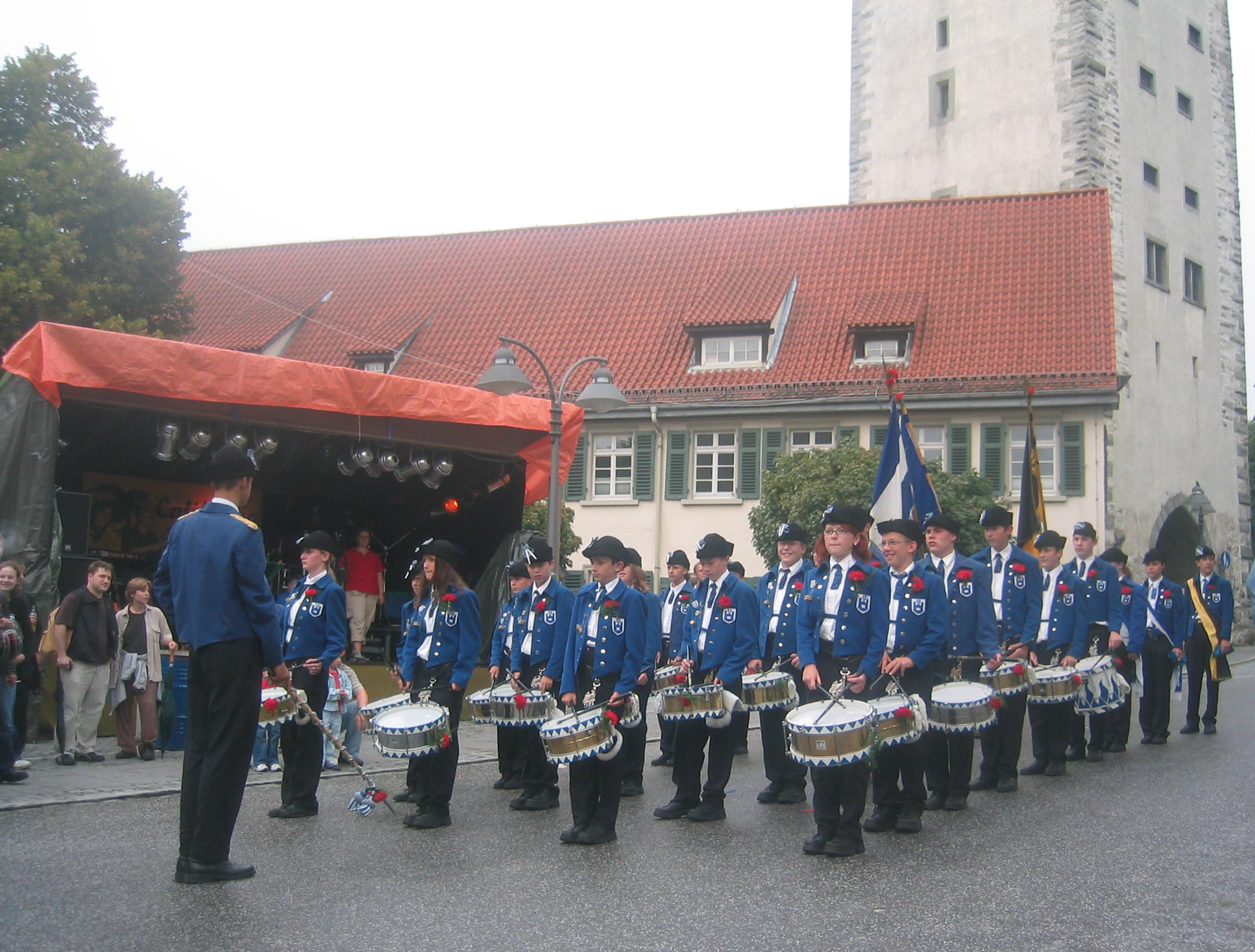 Rutentrommler der Ravensburger Hauptschulen, Rutenfest 2004, Ravensburg, Germany